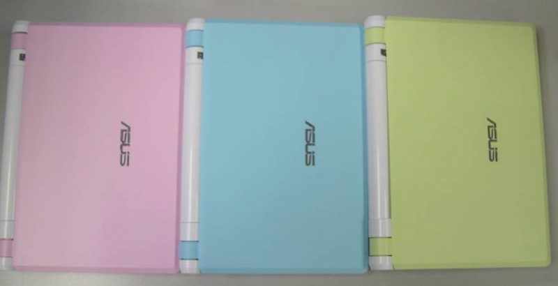 Asus Eee : Pastel Colours